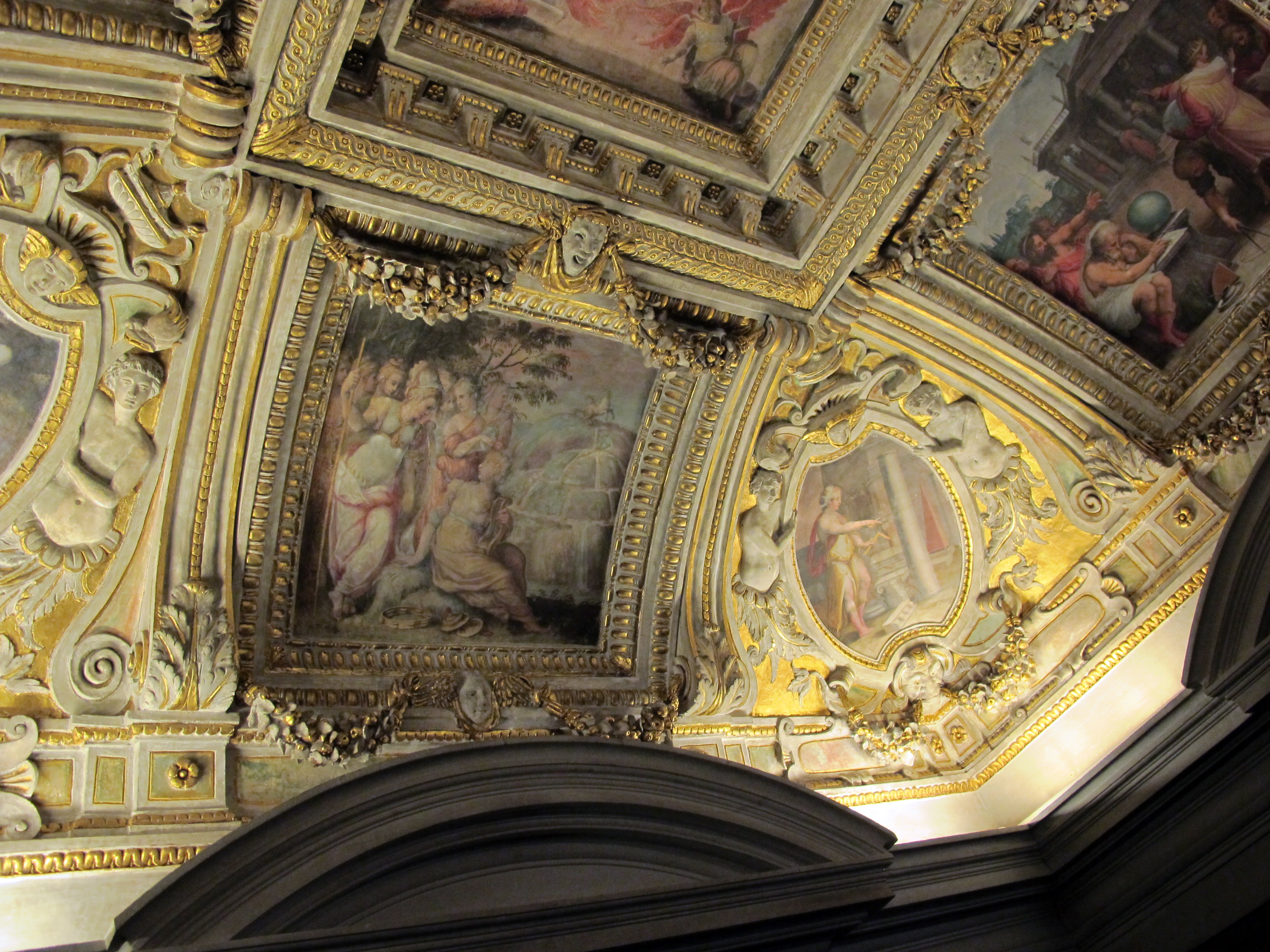 Tesoretto di cosimo I, volta, poesia